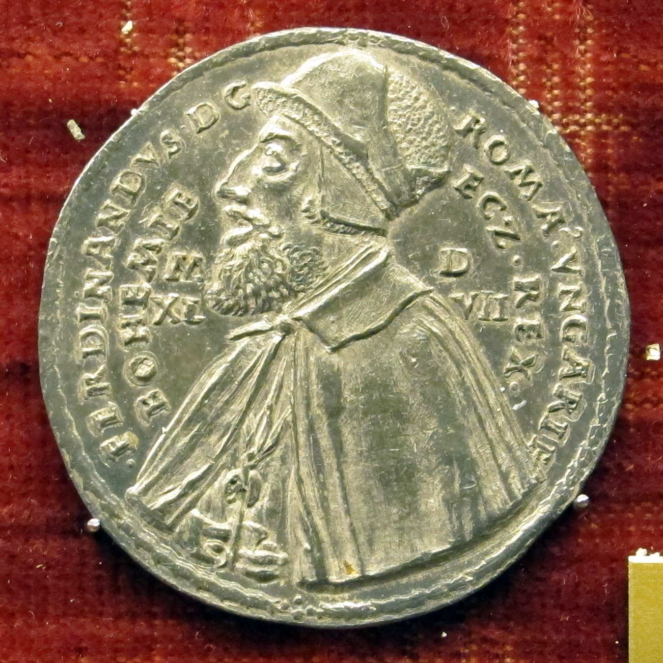 Medaglie austriache, varie date